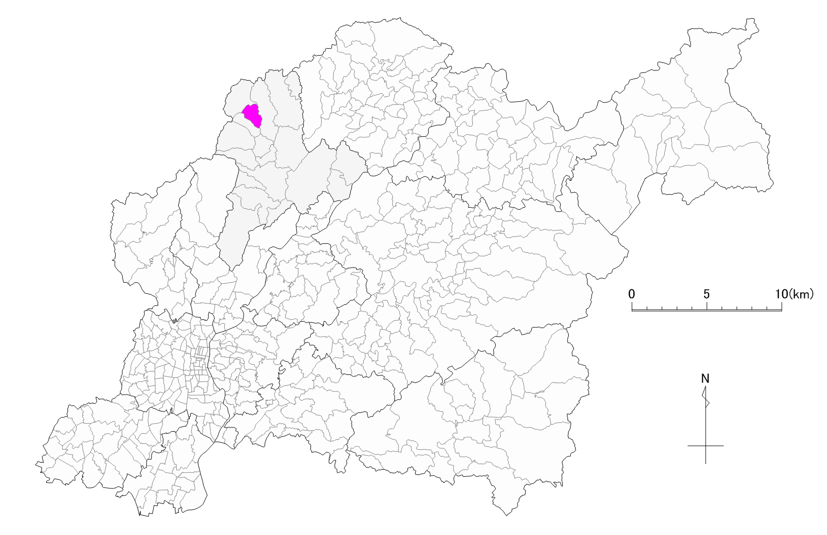 豊田市石畳町位置図